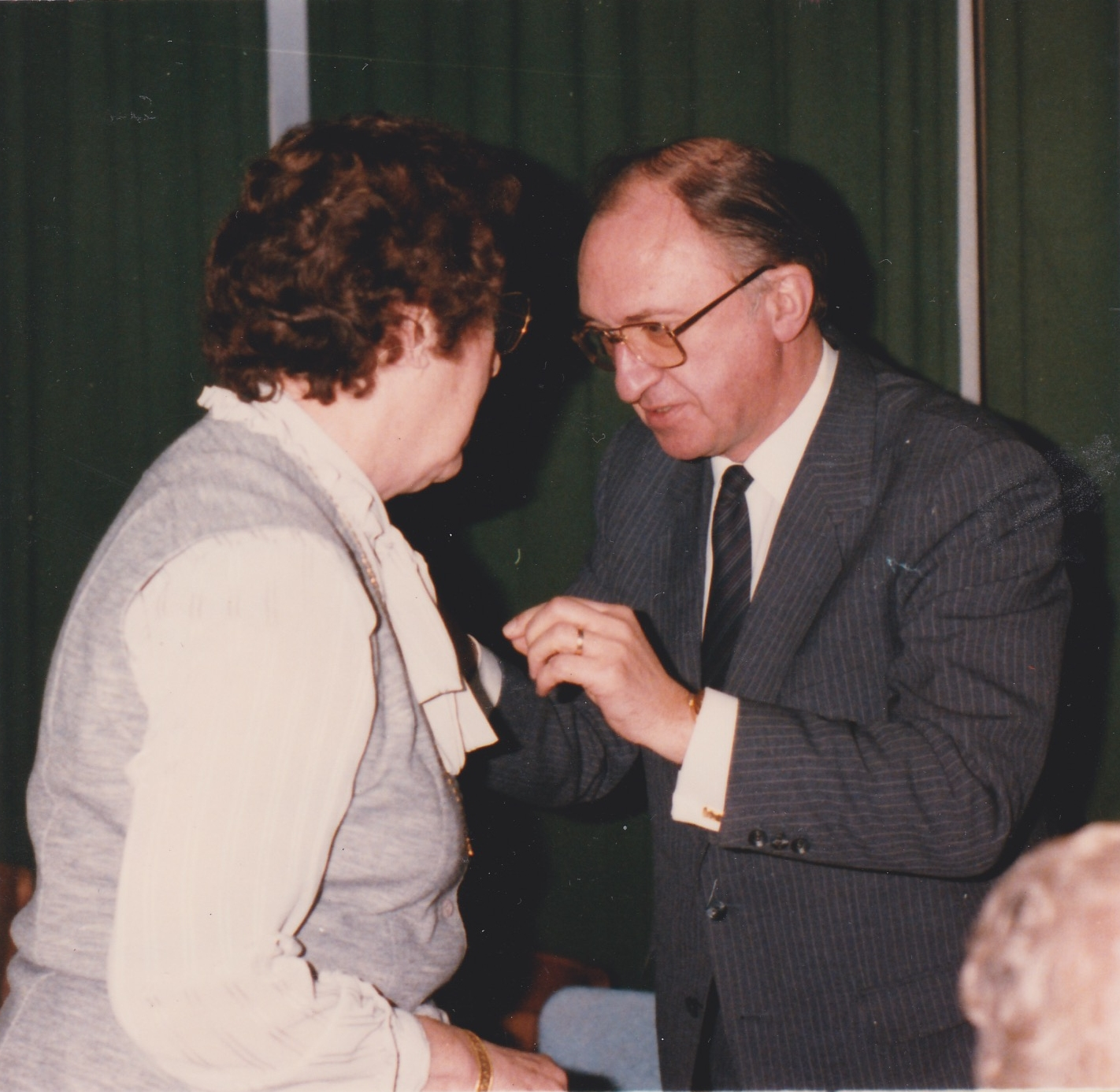 Jacques Monsaert was CVP-burgemeester van Sint-Amandsberg voor de periode 1971-1976. Later bij de fusie waarbij de gemeente Sint-Amandsberg bij Gent was gevoegd was hij burgemeester van Gent voor de periode1983-1988. Wij zien burgemeester Jacques Monsaert bij gelegenheid van de huldiging 20j. werking van het Nationale Werk Kinderwelzijn te Sint-Amandsberg in het jaar 1984.